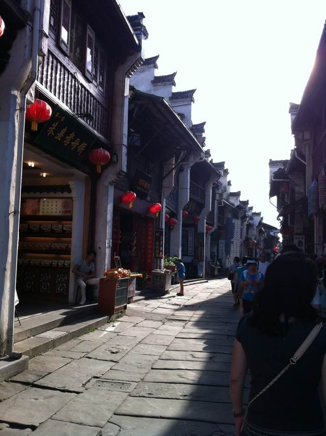 中文（中国大陆）: 安徽，屯溪老街